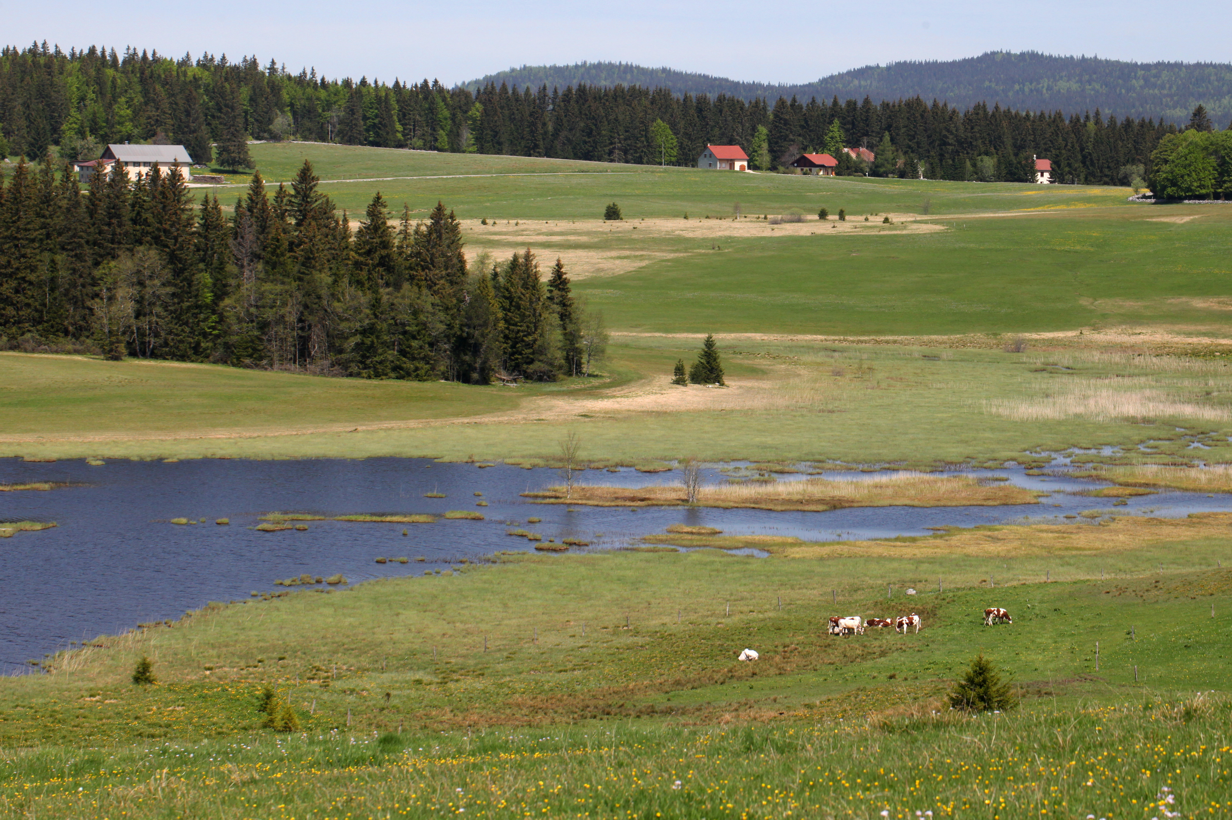 La partie nord du lac des Mortes avec quelques vaches en avant-plan.